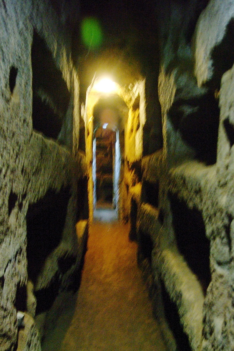 Katakombe in Rom